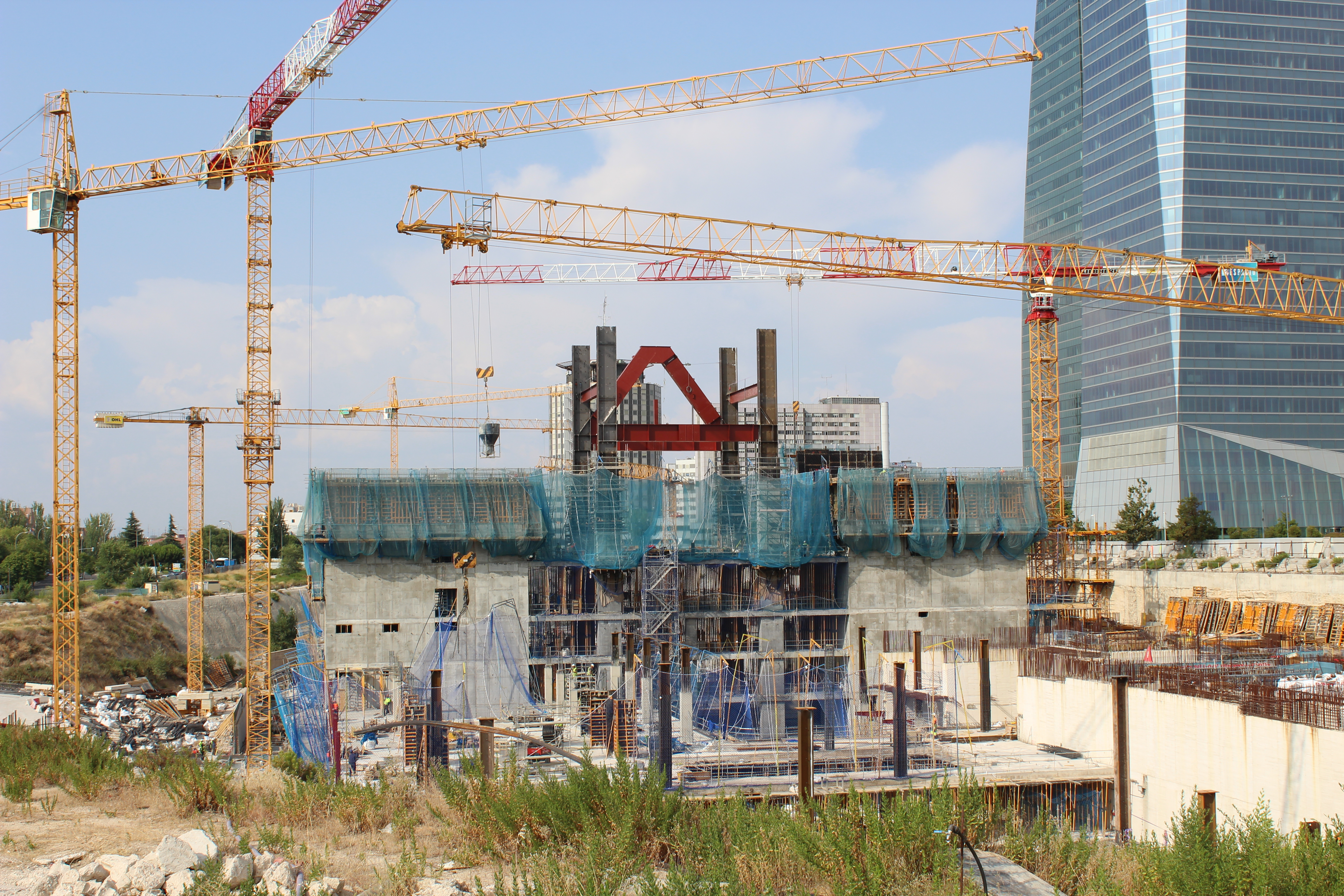 Torre Caleido (Madrid).